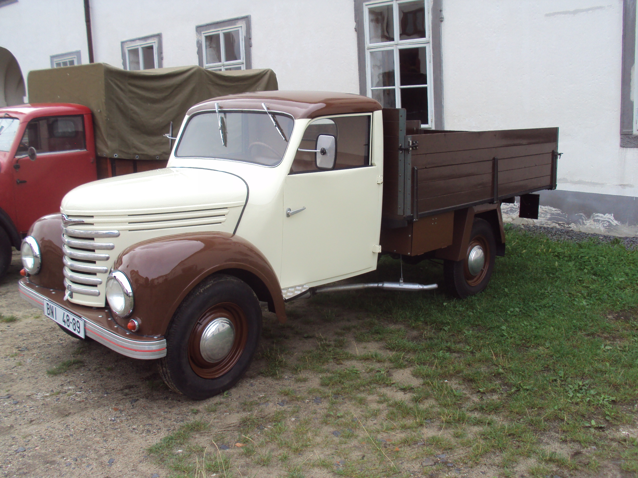 Ze srazu příznivců Barkasů v Zákupech 2012